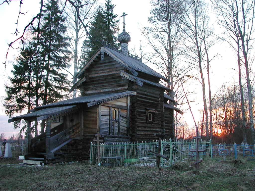 Церковь Рождества Пресвятой Богородицы (деревянная) (Вологодская область, Бабаево, деревня Лиственка)